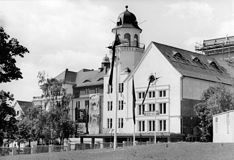 Berlin-Lichtenberg, Zentralhaus der Jungen Pioniere Zentralbild Köhler Mü-Qu Das Zentralhaus der Jungen Pioniere in Berlin-Lichtenberg (früher Haus der Kinder)